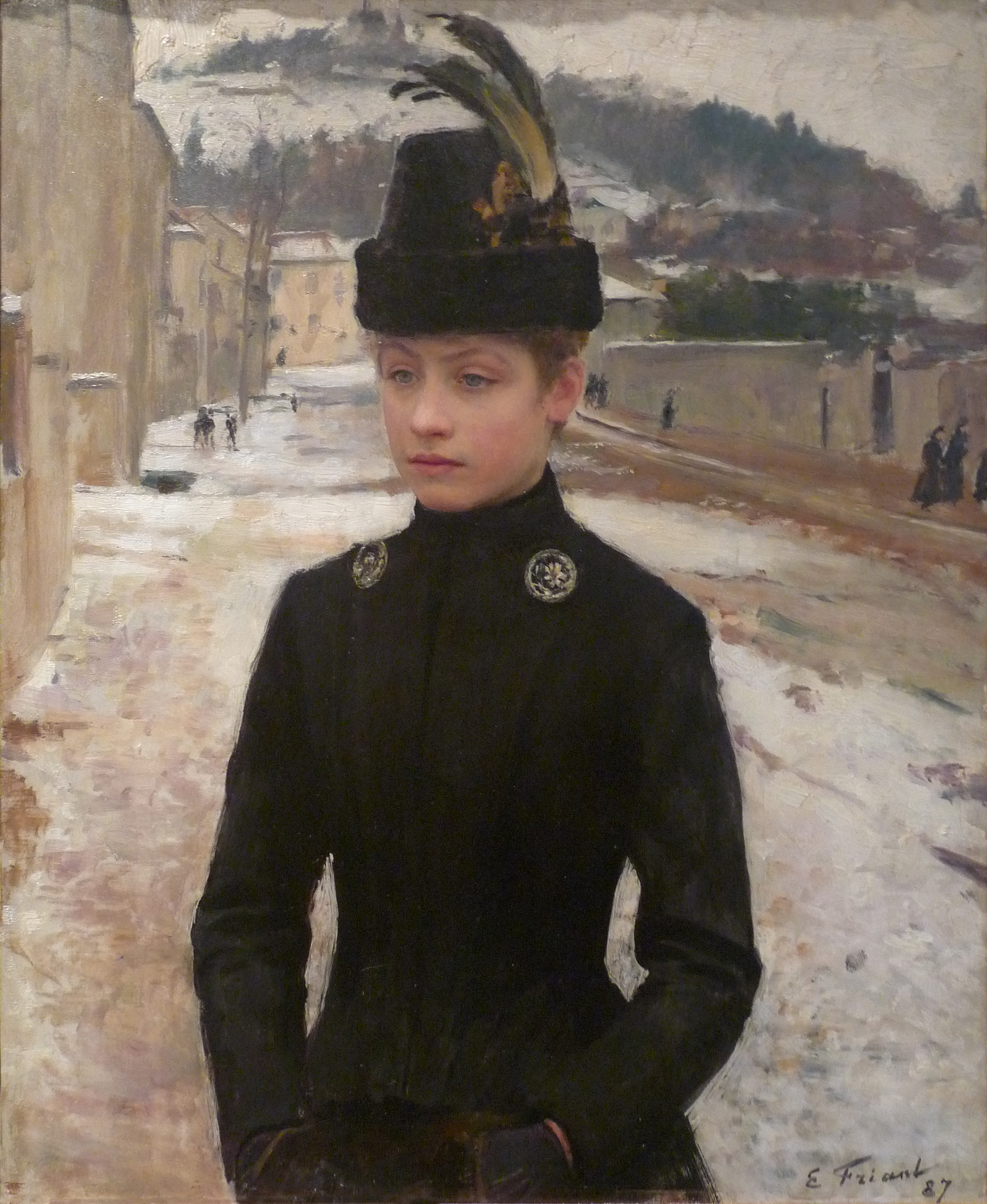 Emile Friant, Jeune Nancéienne dans un paysage de neige, huile sur toile, 1887, Musée des beaux-arts de Nancy